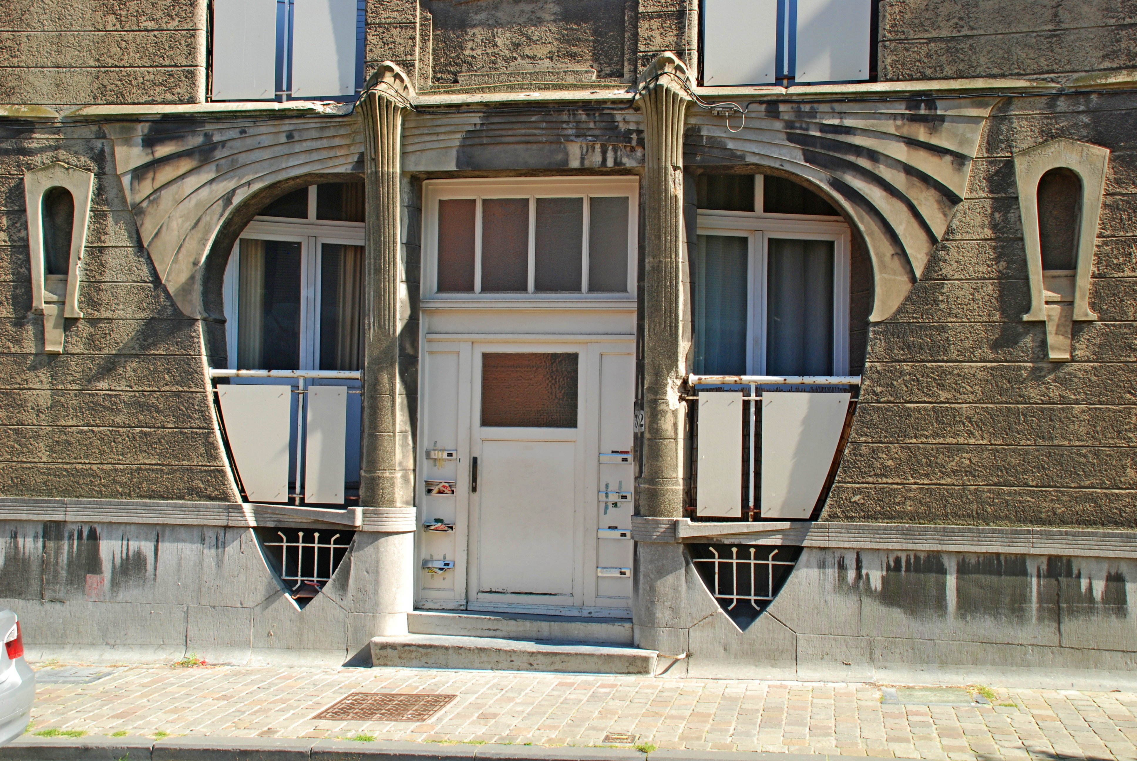 Belgique - Bruxelles - Forest - Habitations sociales Marconi - rue Marconi 32 (Art nouveau, architecte Léon Govaerts, 1901)